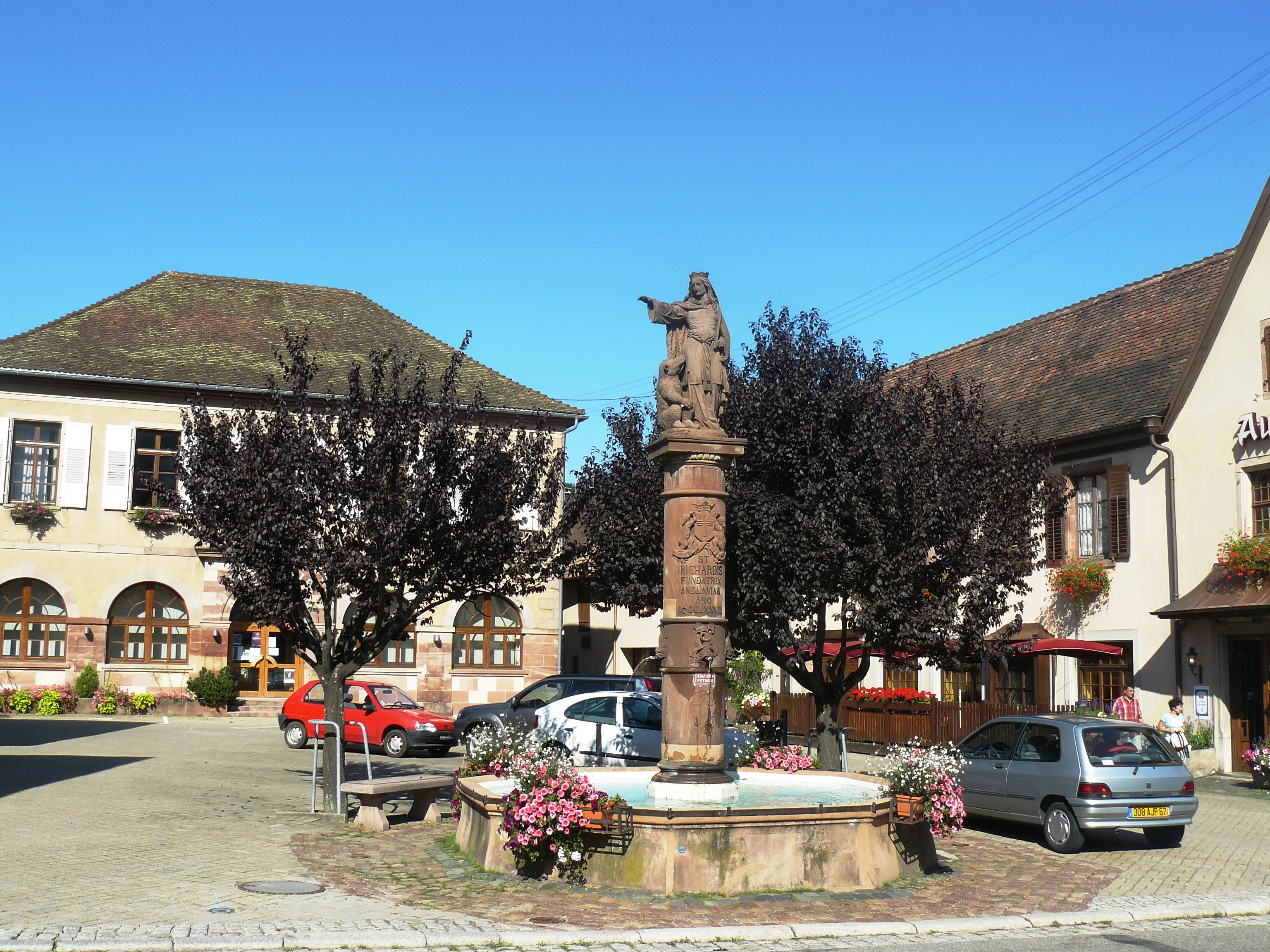 Fontaine Sainte Richarde (1876) à Andlau (Bas-Rhin)